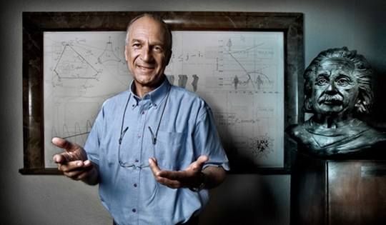 פרופסור למדעי המחשב דוד הראל